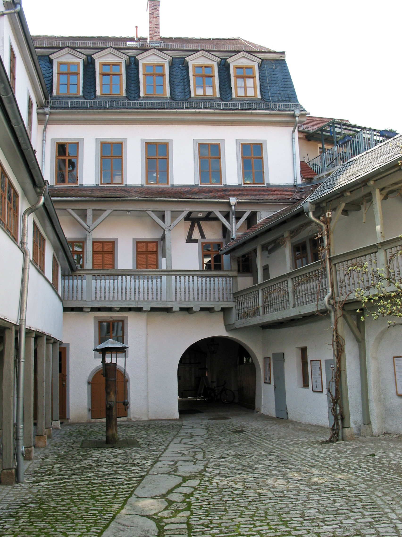 Umlaufende Galerie des Kirms-Krackow-Hauses in Weimar, eines der ältesten erhaltenen Bürgerhäuser der Stadt. Es ist Zeugnis der damaligen bürgerlichen Wohnkultur und gilt als Architekturdenkmal. 1701 kam das Anwesen in den Besitz der Familie Kirms. Heute ist es als Museum öffentlich zugänglich.